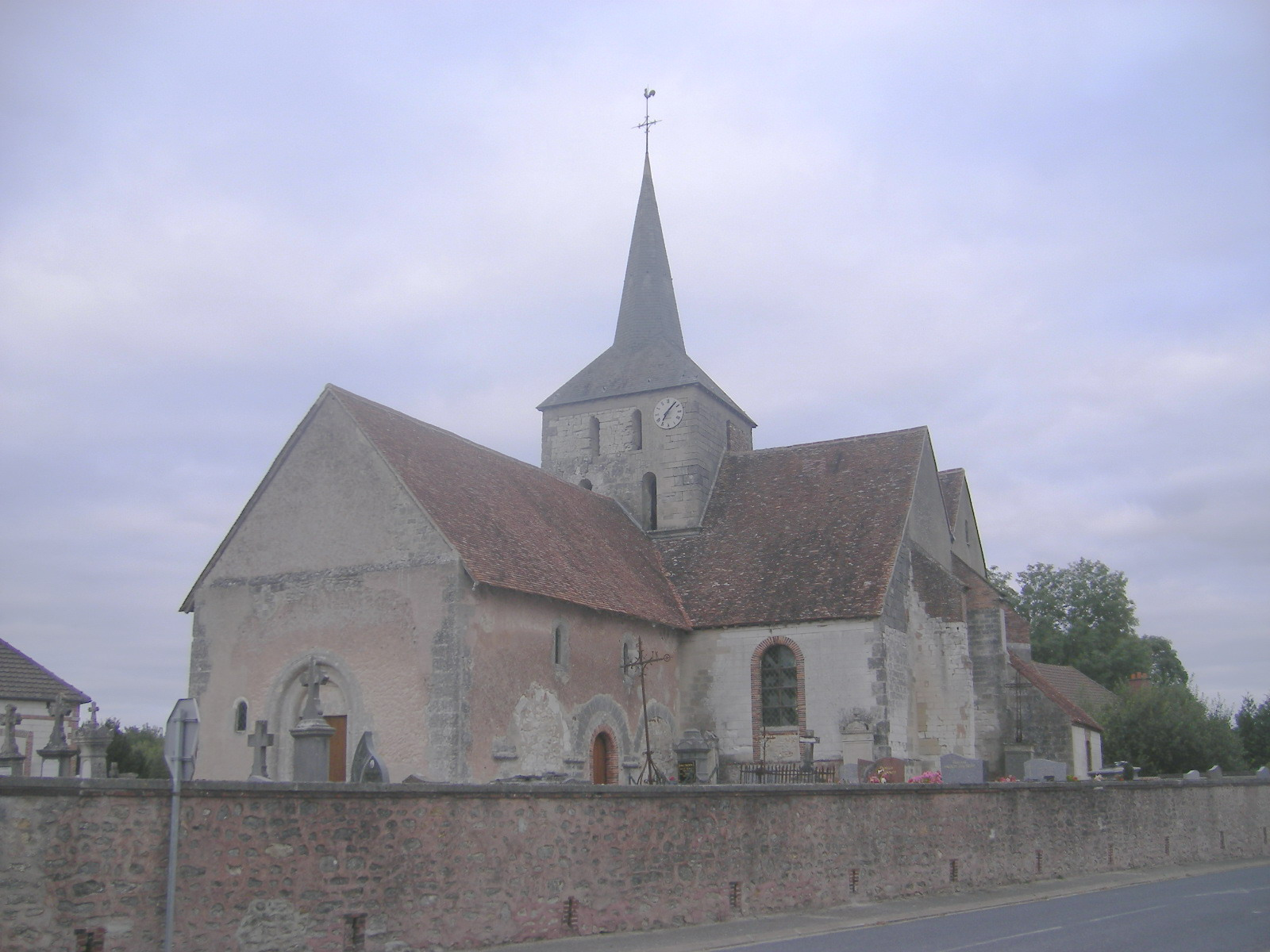 Gourgançon